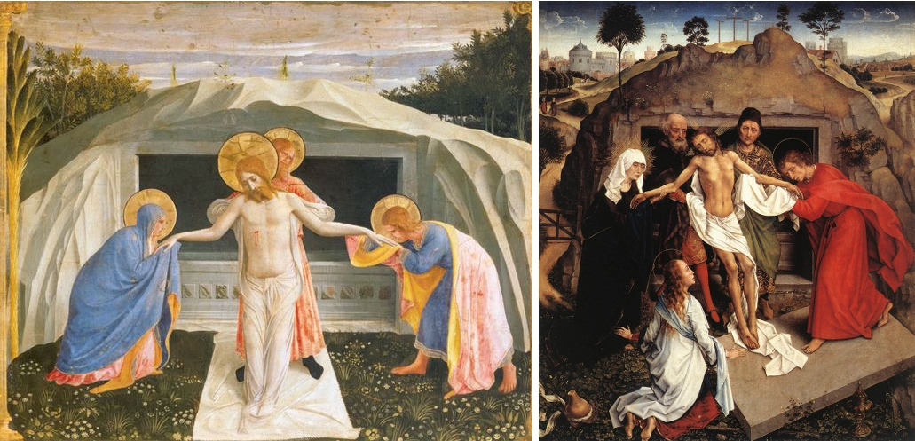 Vergleich zweier Grablegungen von Fra Angelico (zwischen 1386 und 1400–1455) und Rogier van der Weiden (1399/1400–1464)